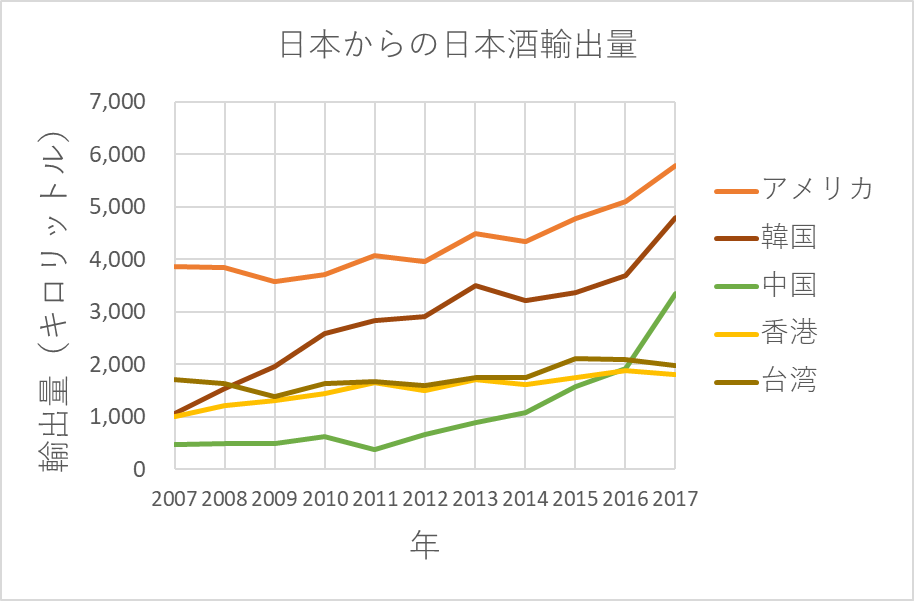 JETROの日本酒輸出ハンドブックのデータを基にExcelで作成